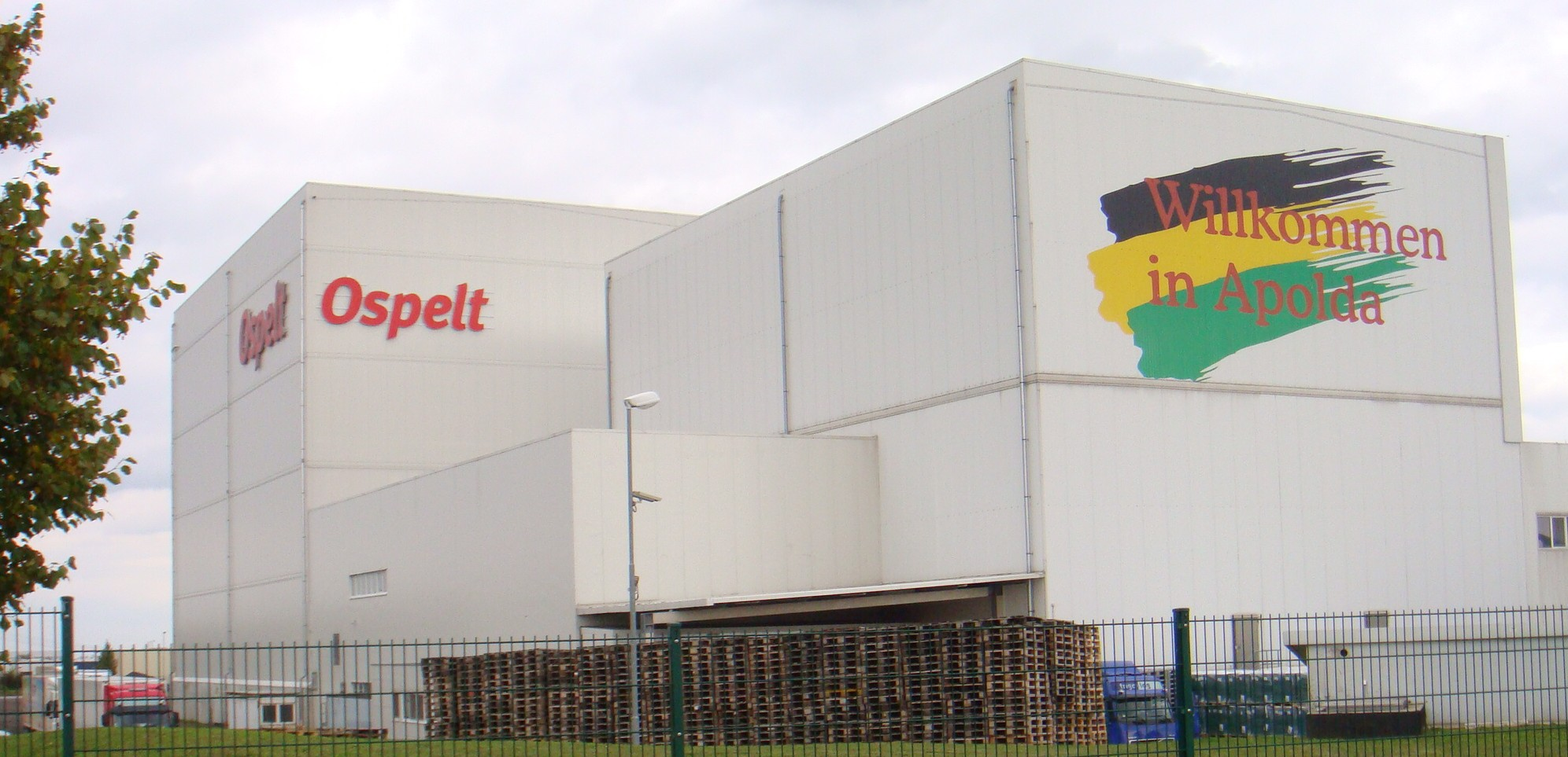 Firma Ospelt stellt Pizzen her